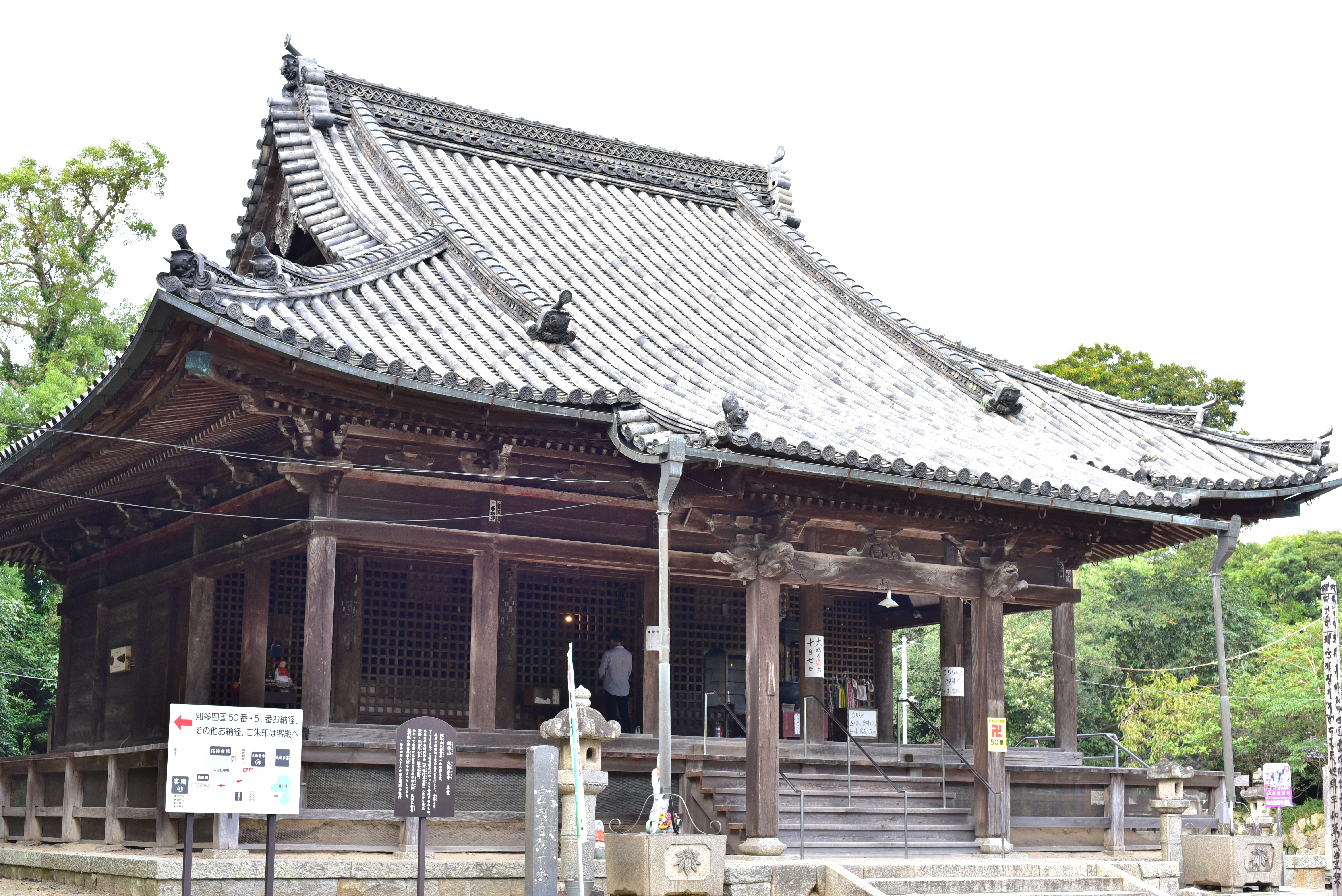 大御堂寺本堂 Nikon D750